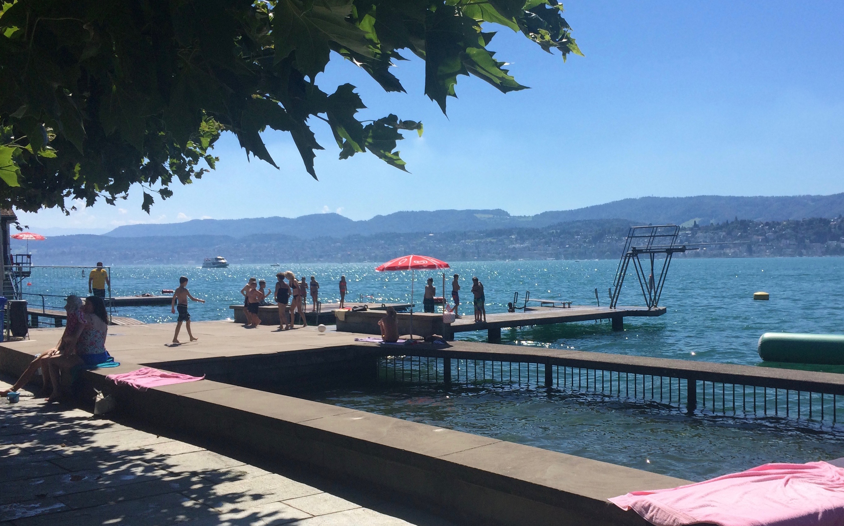 Seebadi Zollikon